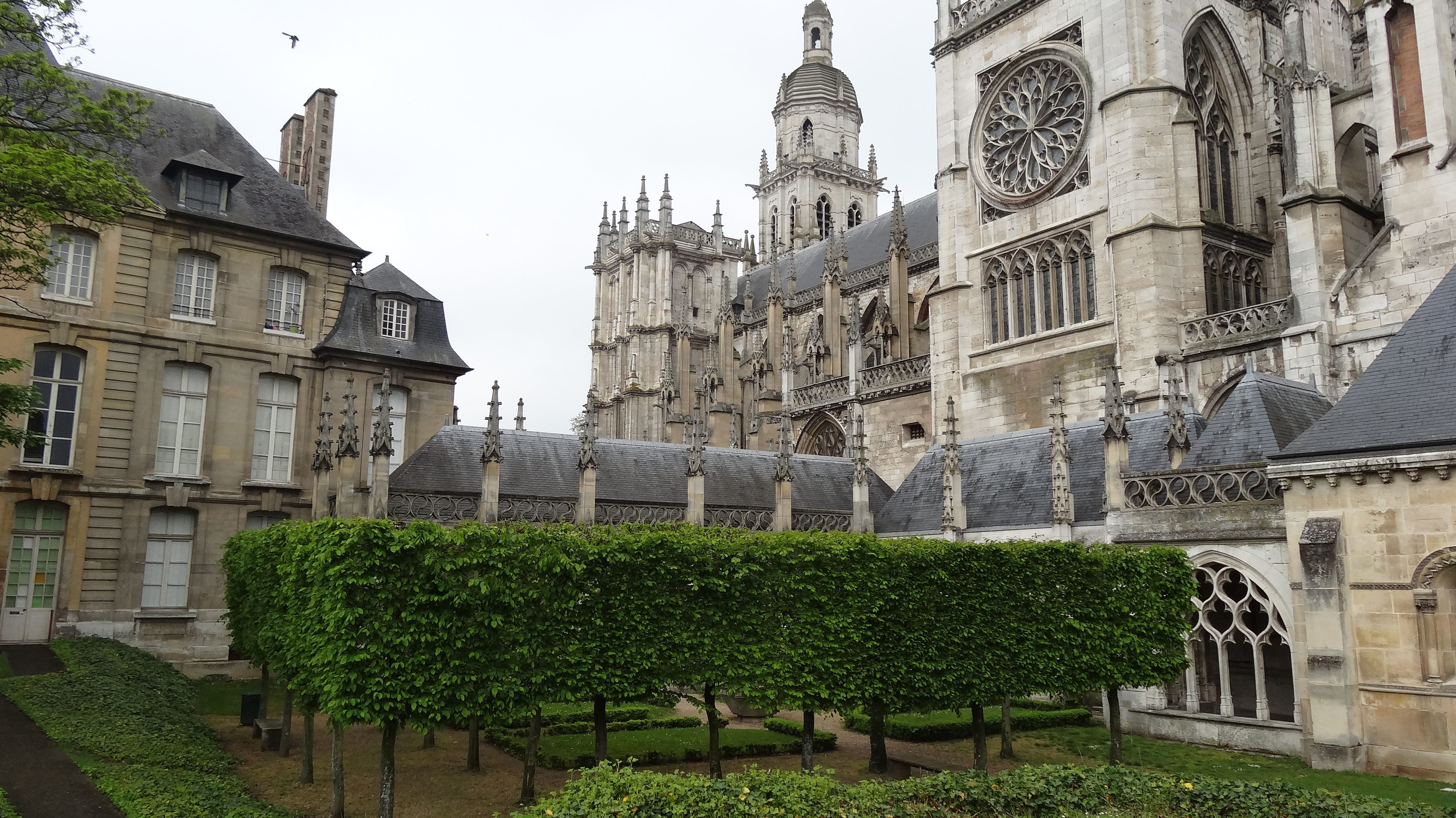 Cathédrale Notre-Dame d'Évreux et musée de l'ancien évêché (Normandie)